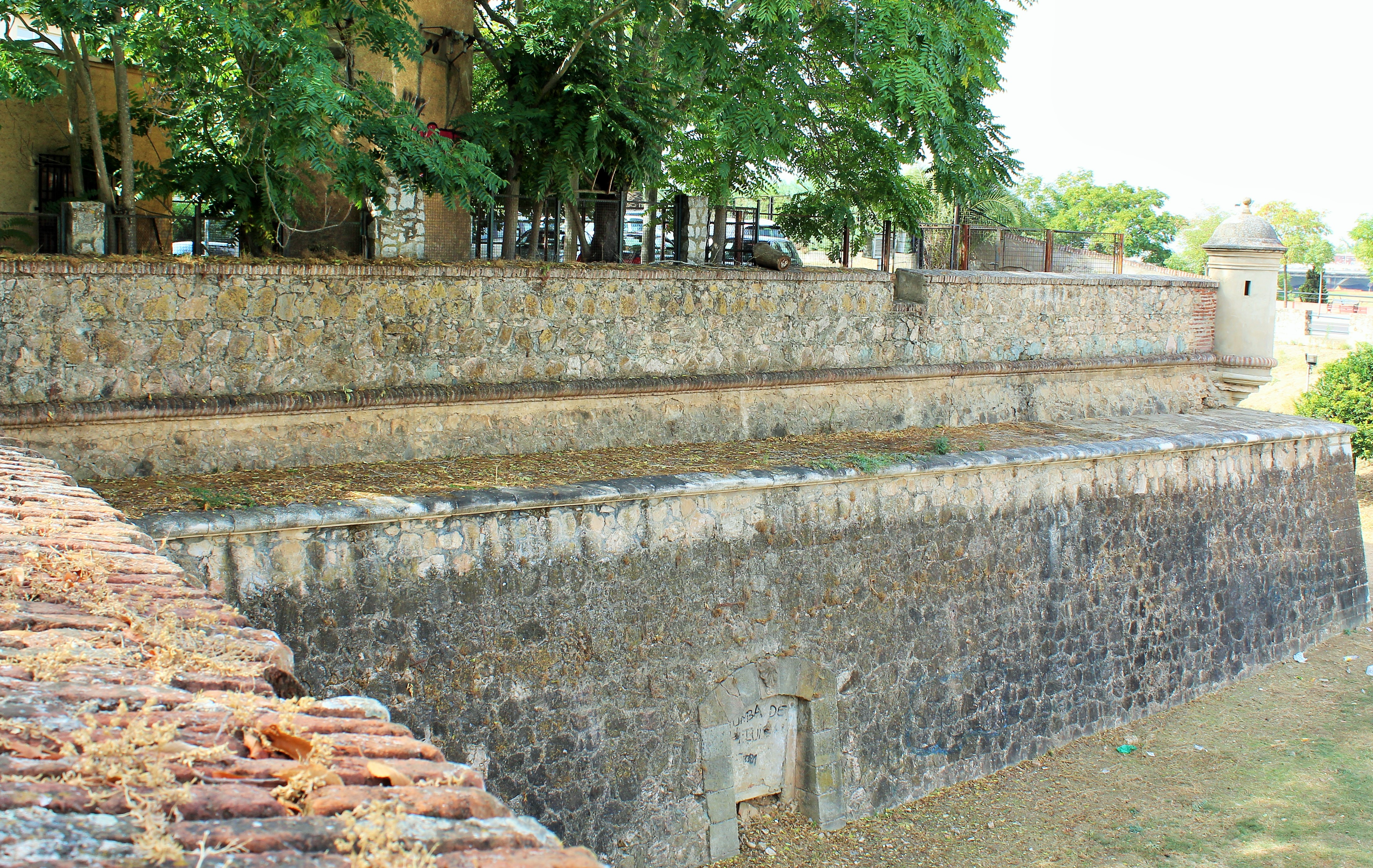 Tres lienzos en "zeta" y puerta de poterna visto desde el interior.